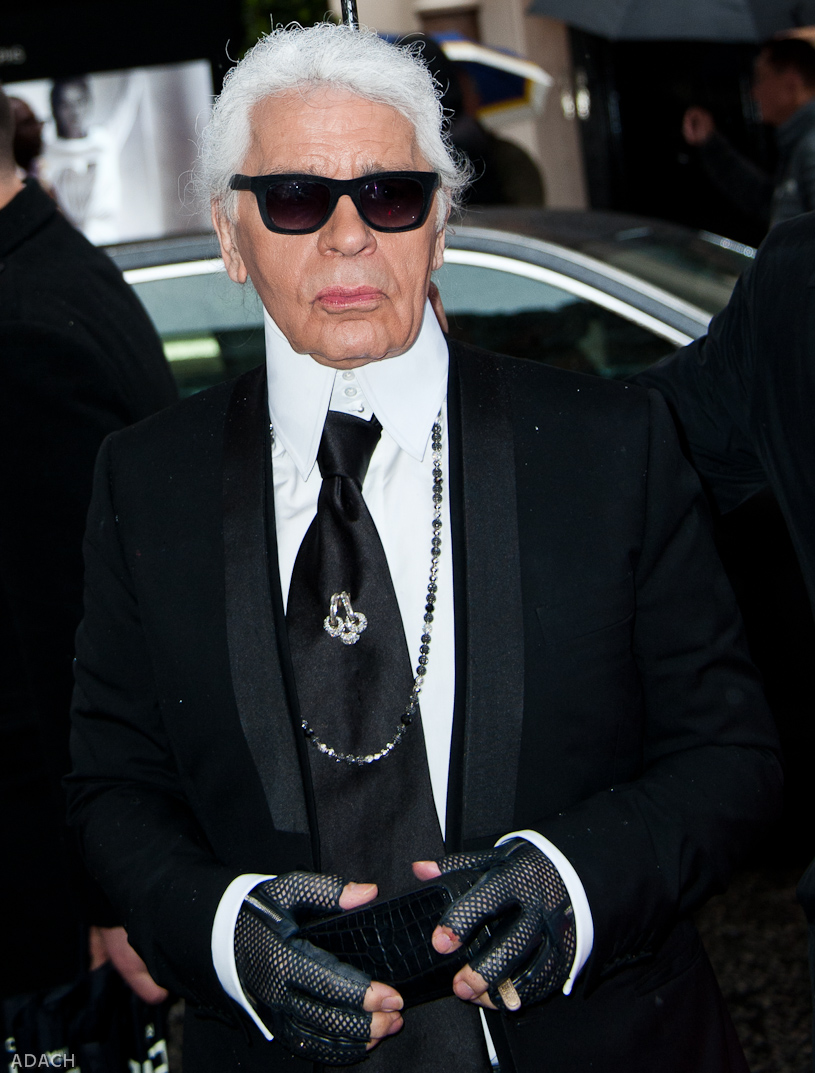 Fendi store opening - Karl Lagerfeld